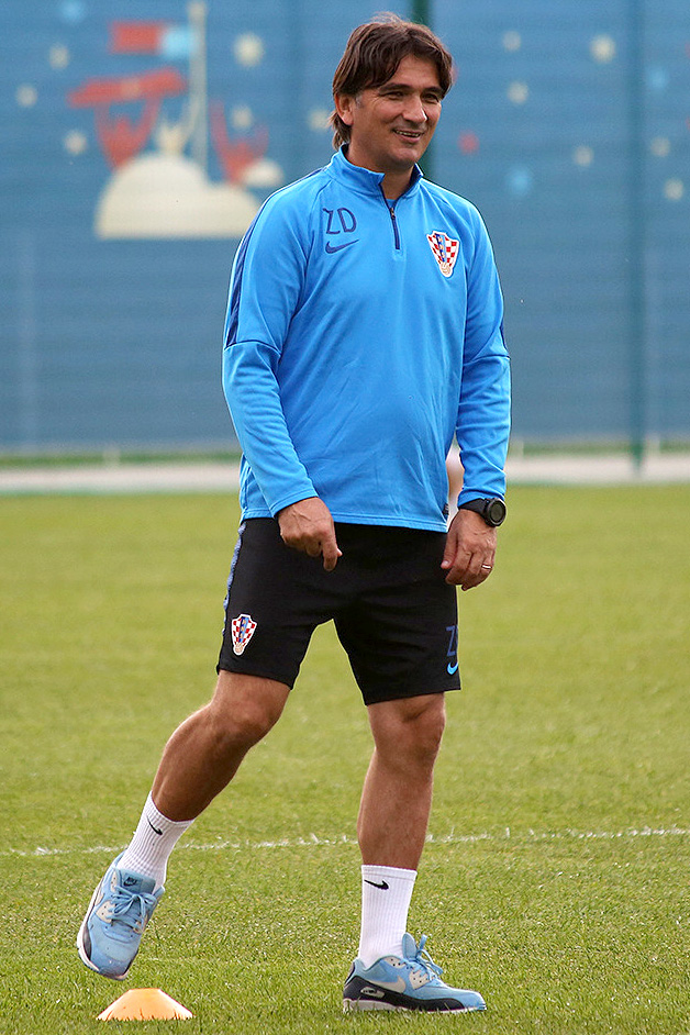 Сборная Хорватии провела первую тренировку в России